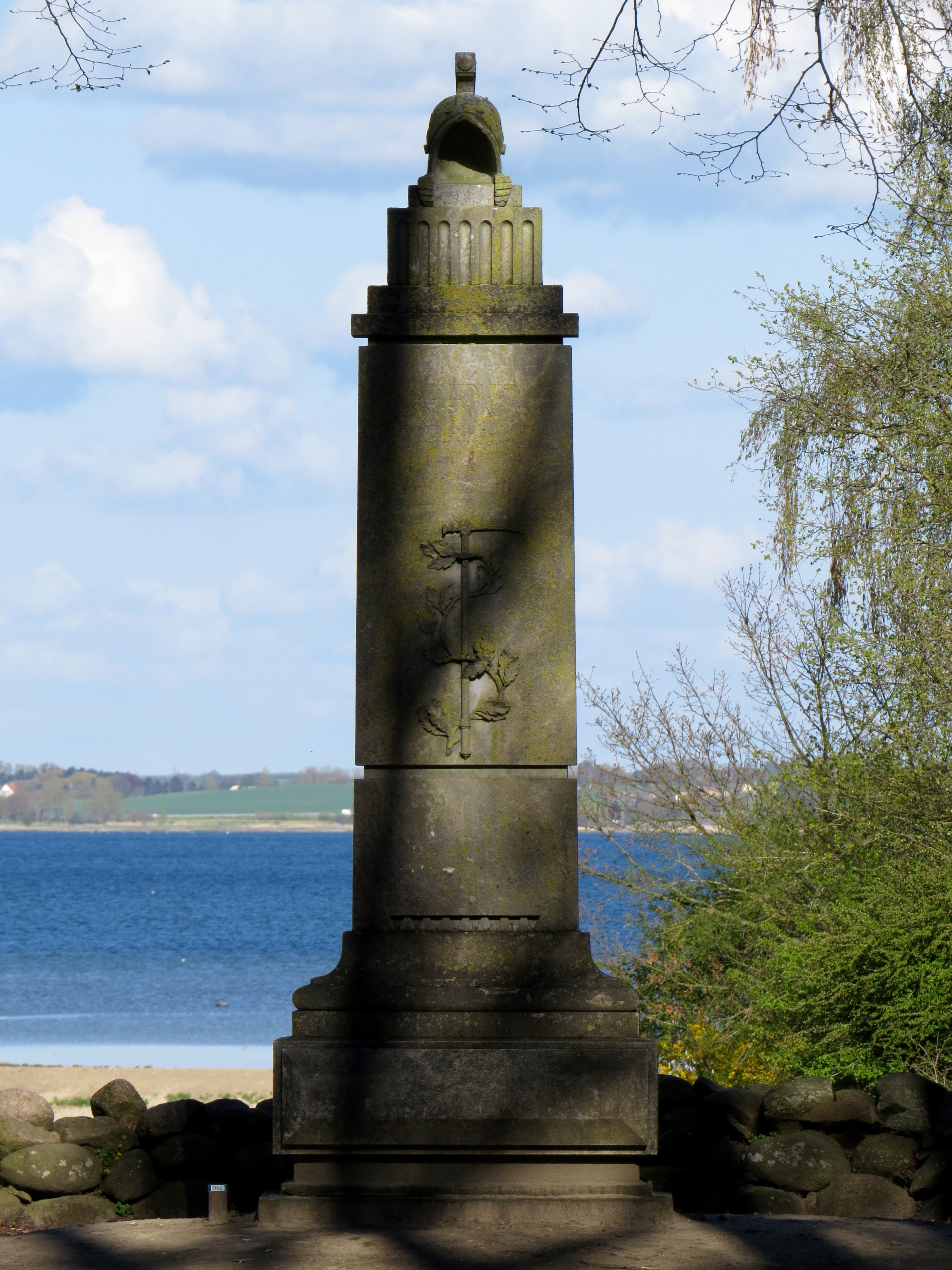 Monument over Benedict, Svend Estridsens søn, af Johannes Wiedewelt, udført i norsk marmor fra Gjellebæk, Mindelunden ved Jægerspris Slot